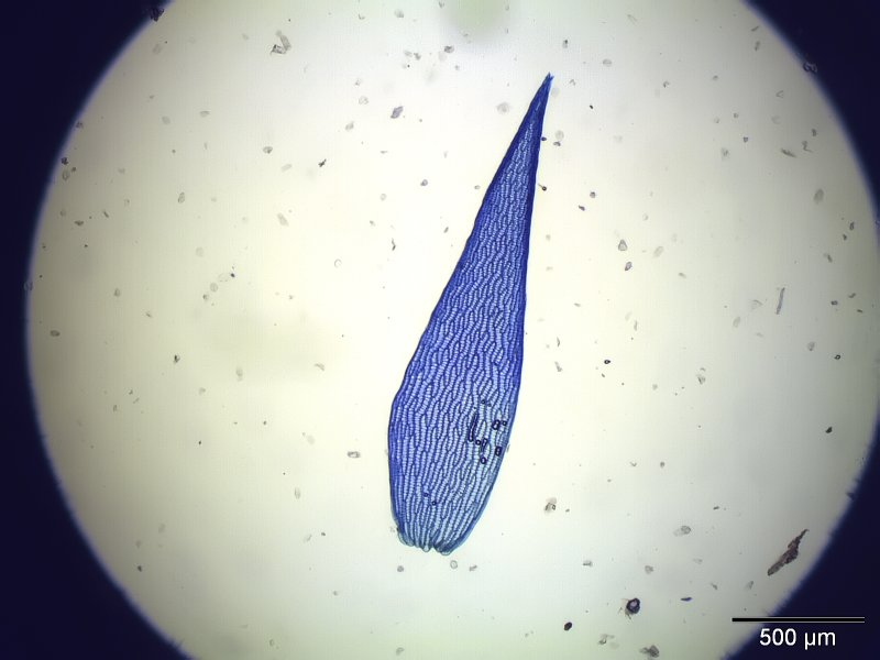 Schmalblättriges Torfmoos (Sphagnum angustifolium), Astblatt, Vergrößerung: 40x